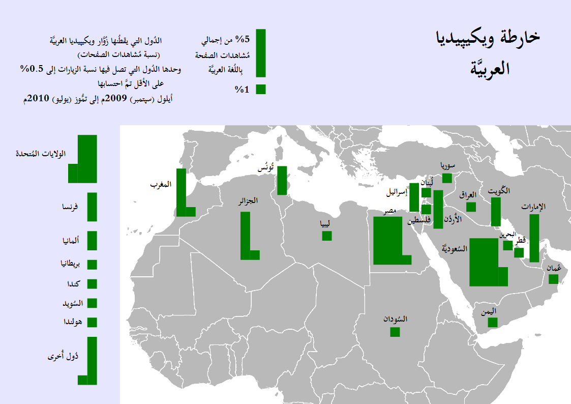 خارطة ويكيپيديا العربيَّة حسب نسبة الزُوَّار من كُل دولة.